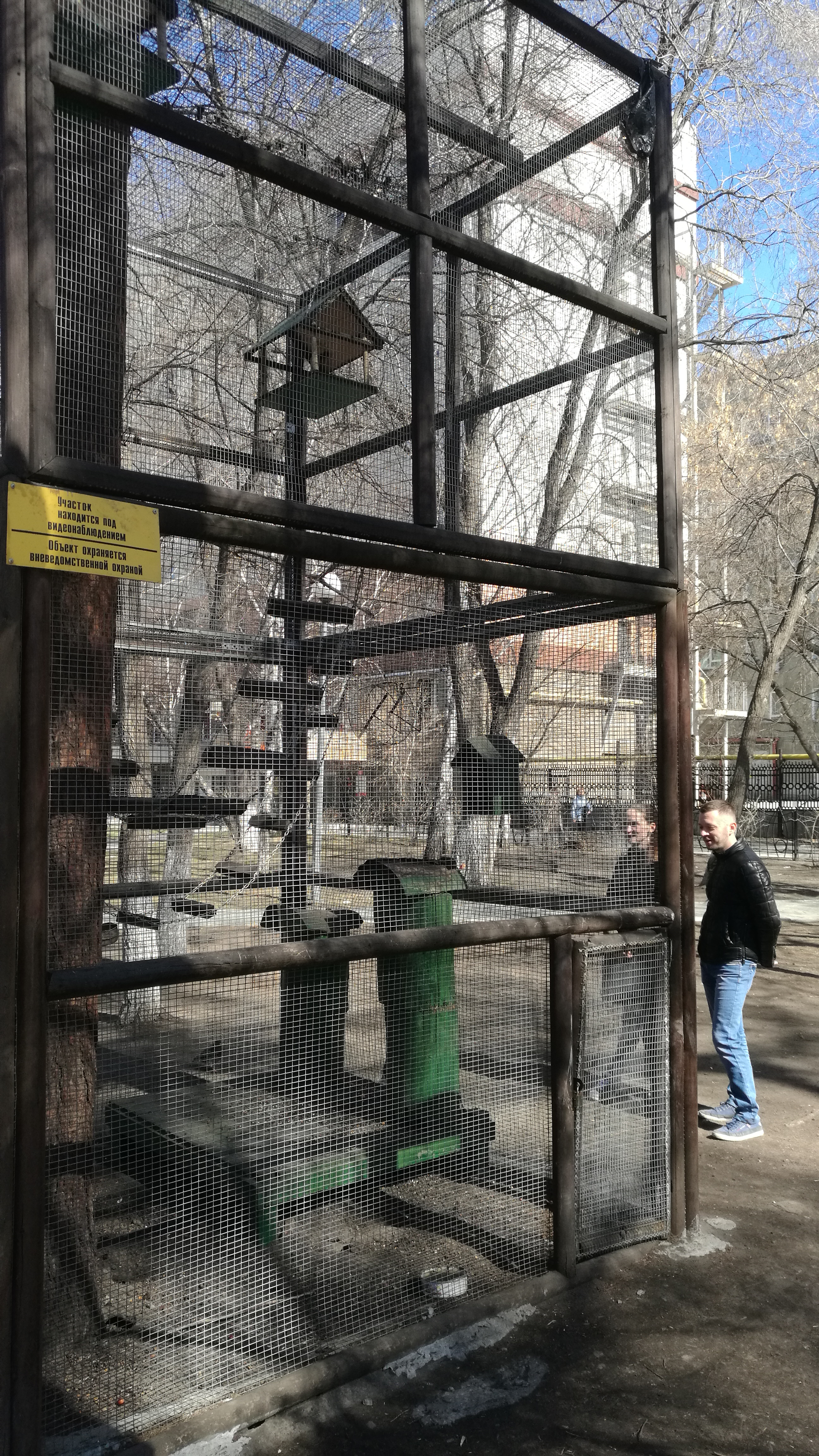 Skvaro de Nemcov. Tjumeno, Rusio.